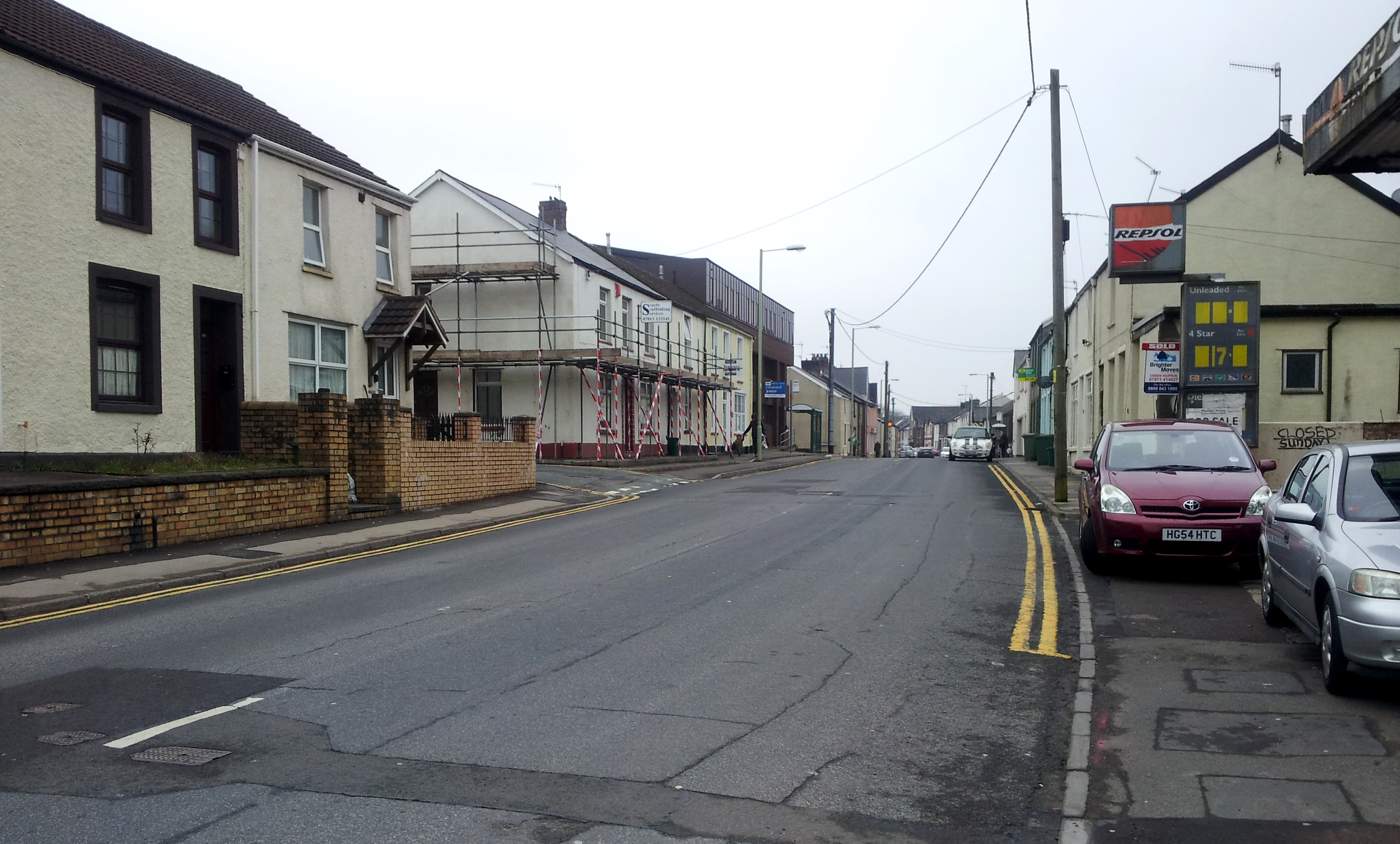 La rue principale de Taff's Well (Rhonda Cynon Taf).